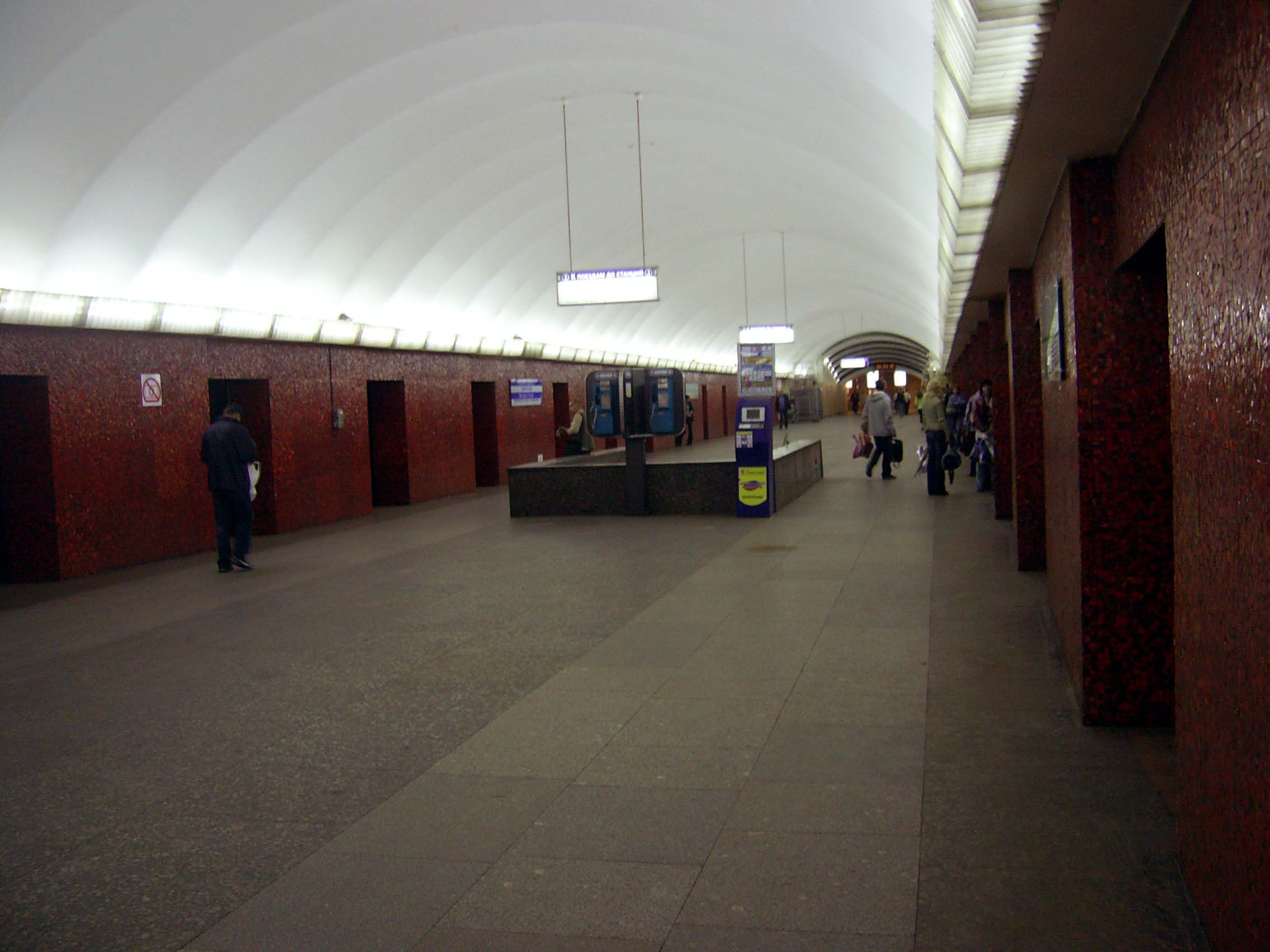 Metro Staion Maykovskaya in S-Petersburg